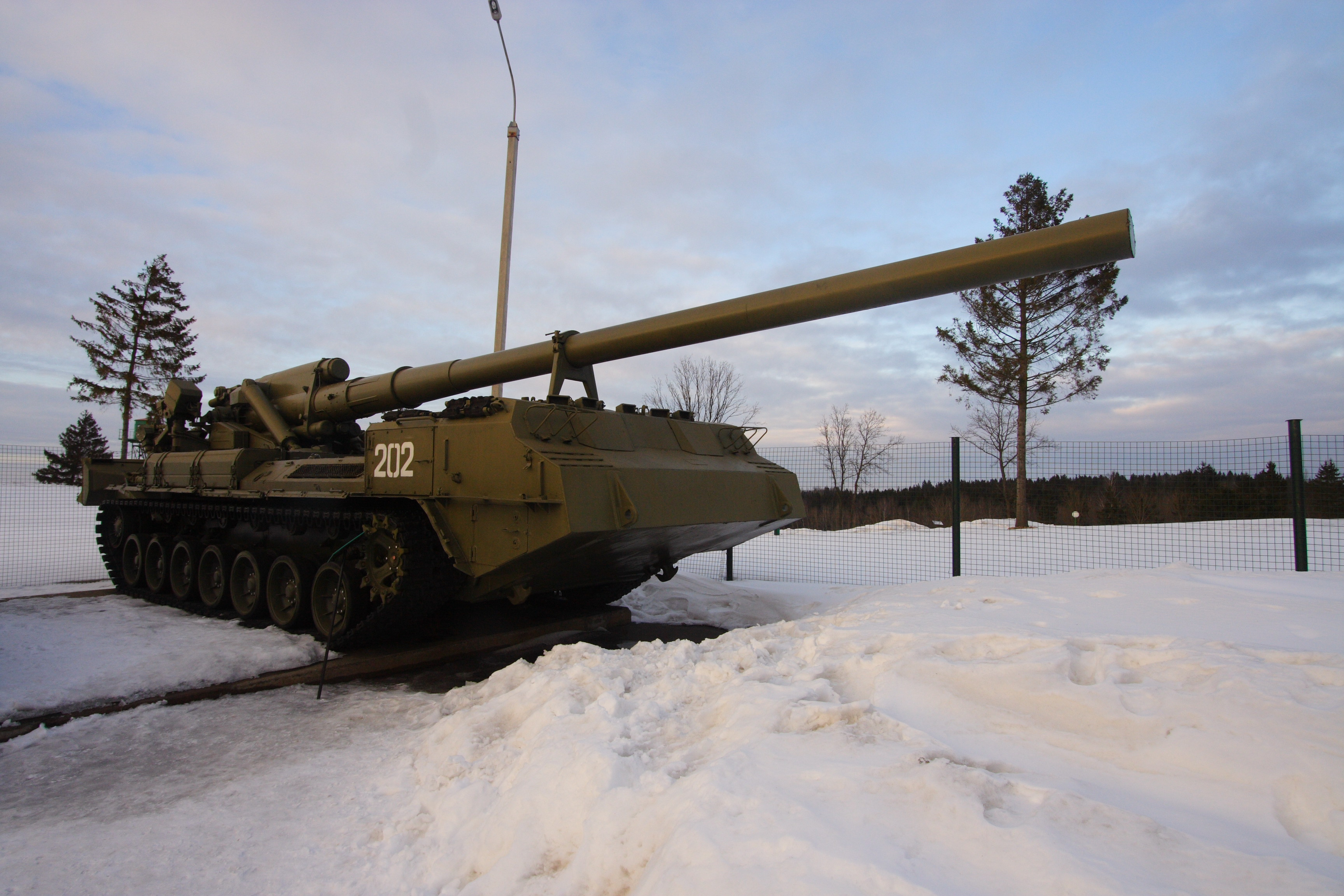 2S7 Pion